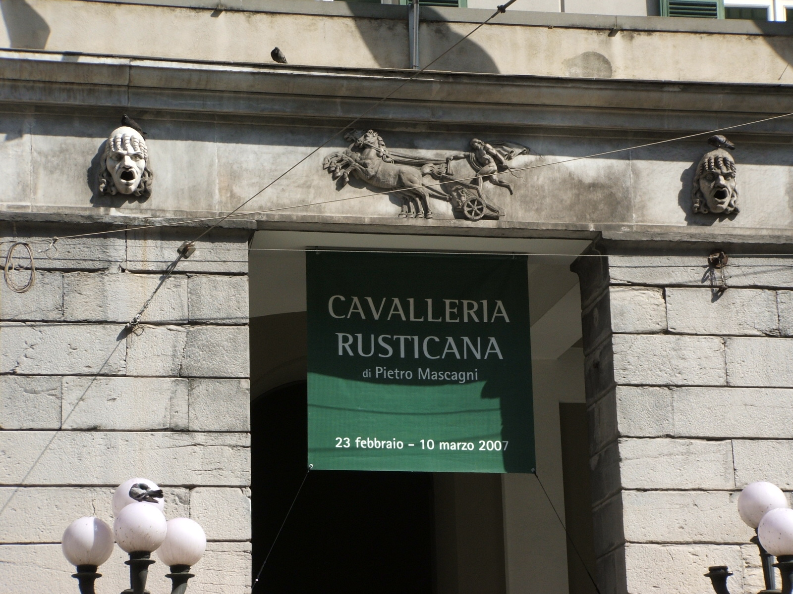 Genova Teatro Carlo Felice (particolare della facciata)